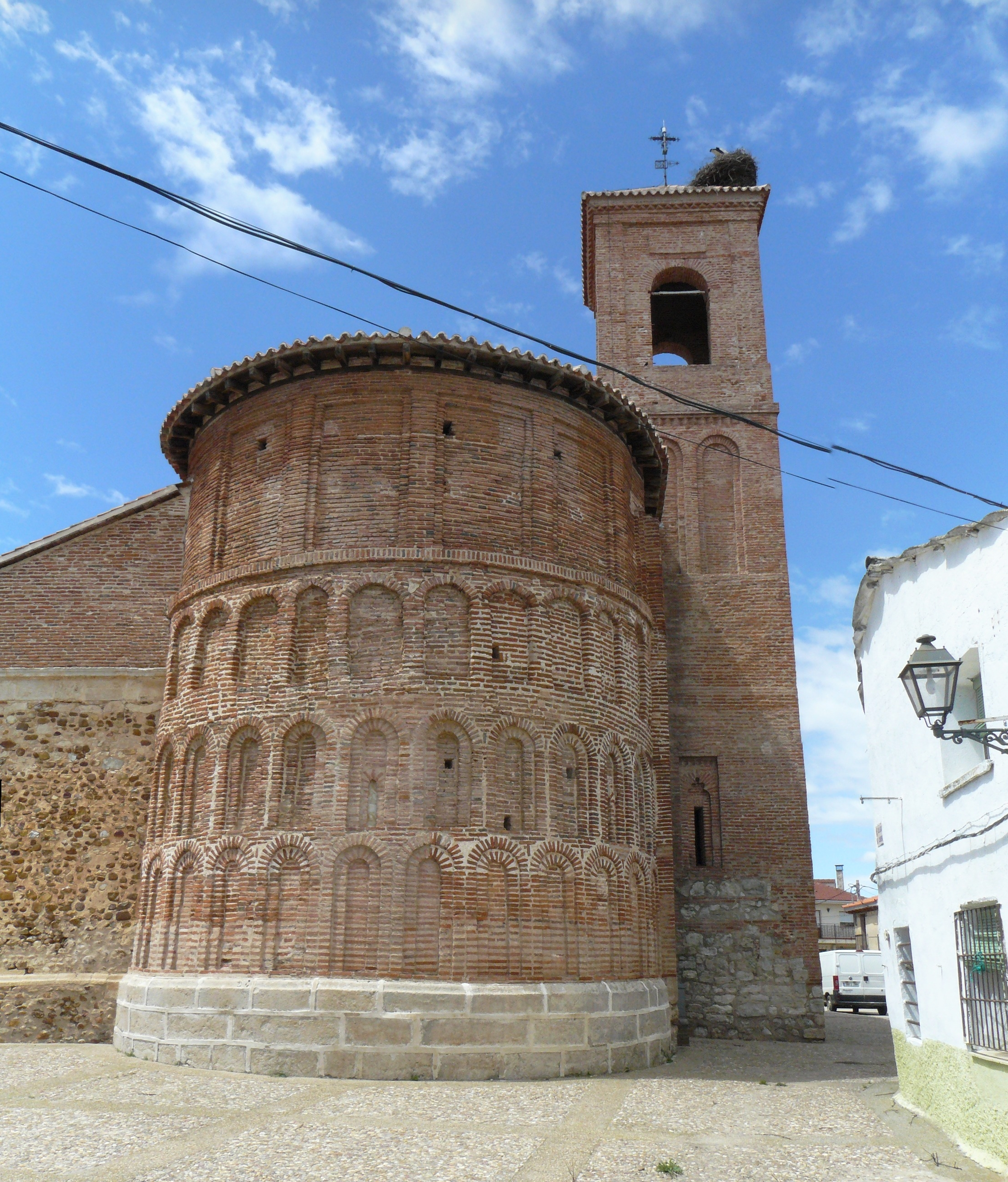 El Cubillo de Uceda, Iglesia de la Asunción de NUstra Señora, Cubillo de Uceda (Gudalajara).